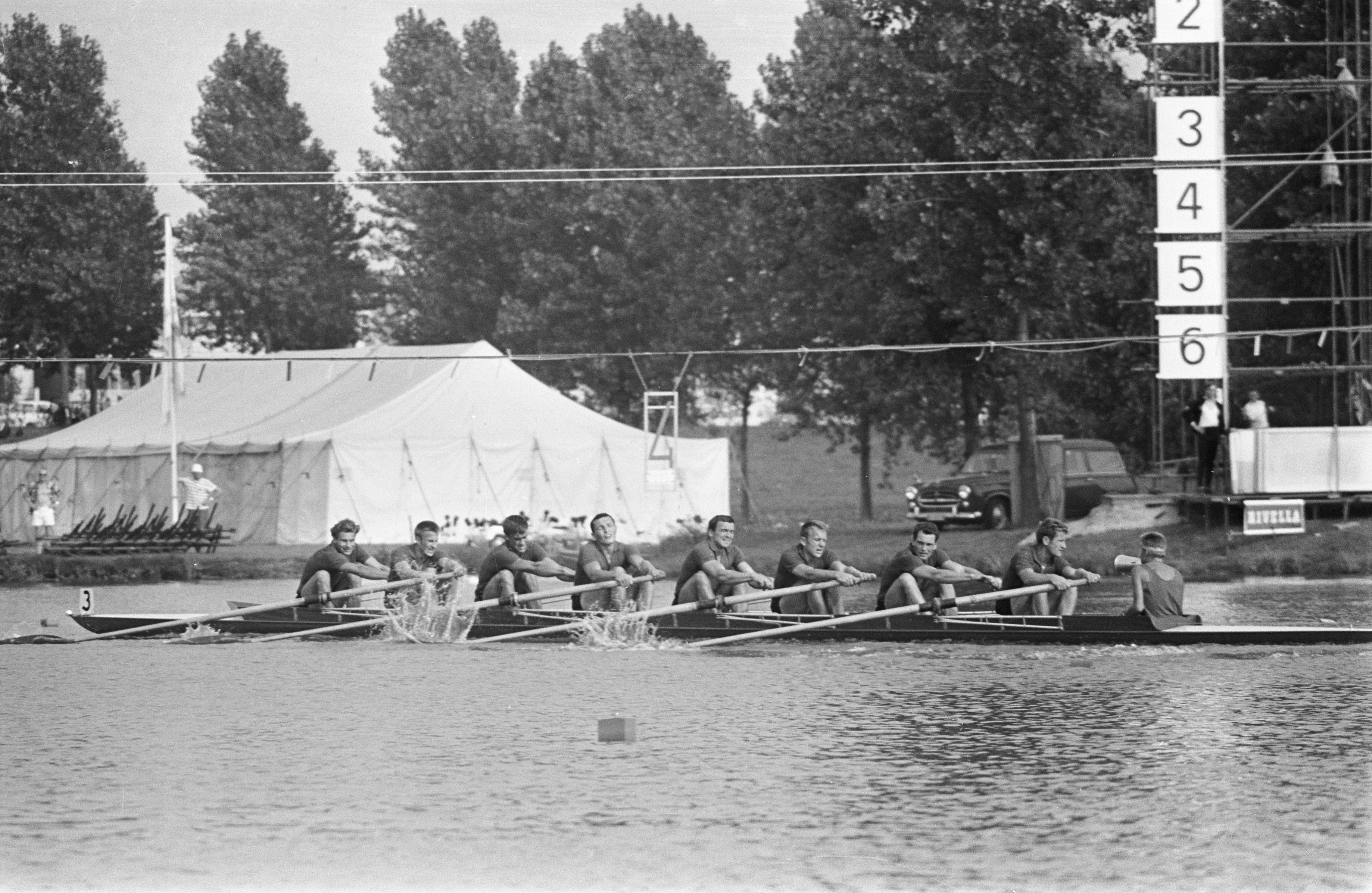 Europese roeikampioenschappen op de Bosbaan, finish Russische acht tijdens voorwedstrijden